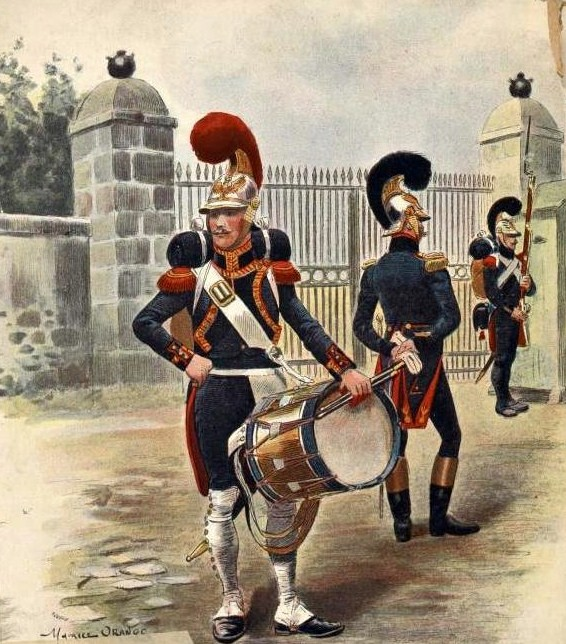 Sapeurs de la Garde impériale. Au premier plan, un tambour. Au second plan, un officier. Au fond, un soldat en faction.